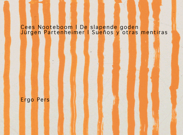 Jürgen Partenheimer, 'De slapende goden / Sueños y otras mentiras', een livre de peintre met gedichten van Cees Nooteboom en lithografieën van Jürgen Partenheimer. Ergo Pers, 2005